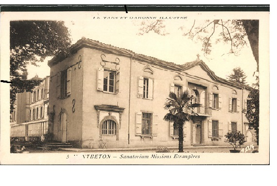 Sanatorium et maison de repos des Missions étrangères de Paris à Montbeton en 1923.